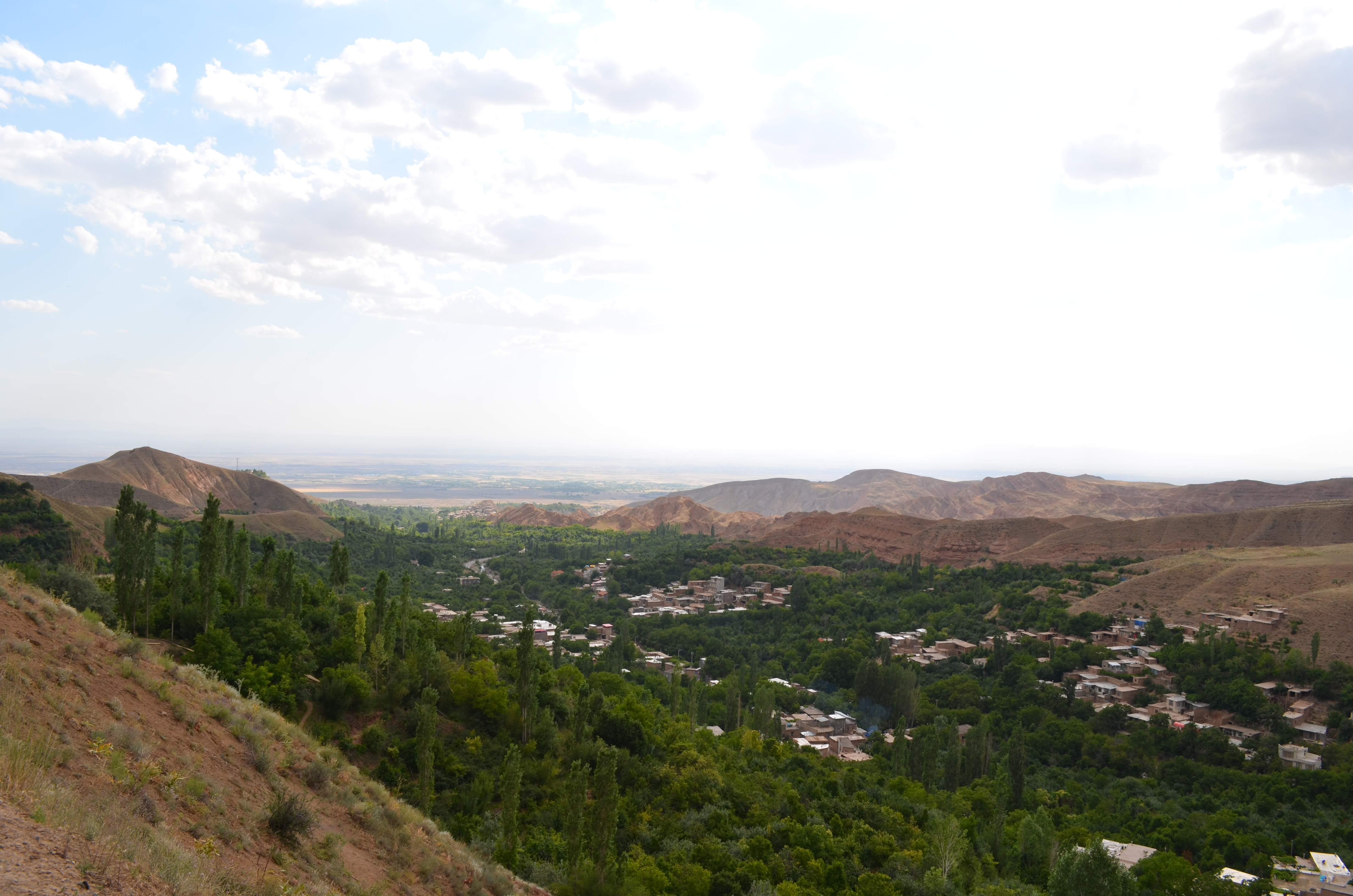 نمایی از بوژان نیشابور حراسان رضوی ایران